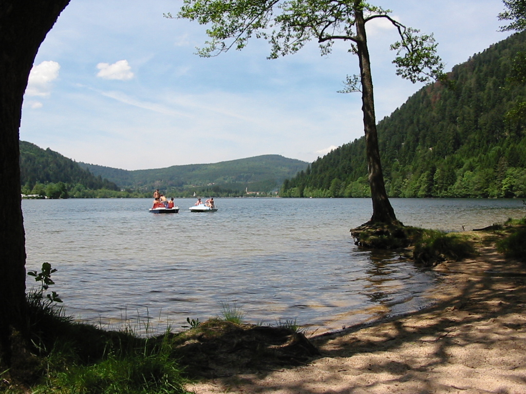 Lac de Longemer Commune de Xonrupt-Longemer (88400), France Photographie personnelle prise le 9 juin 2004. Copyright © Christian Amet